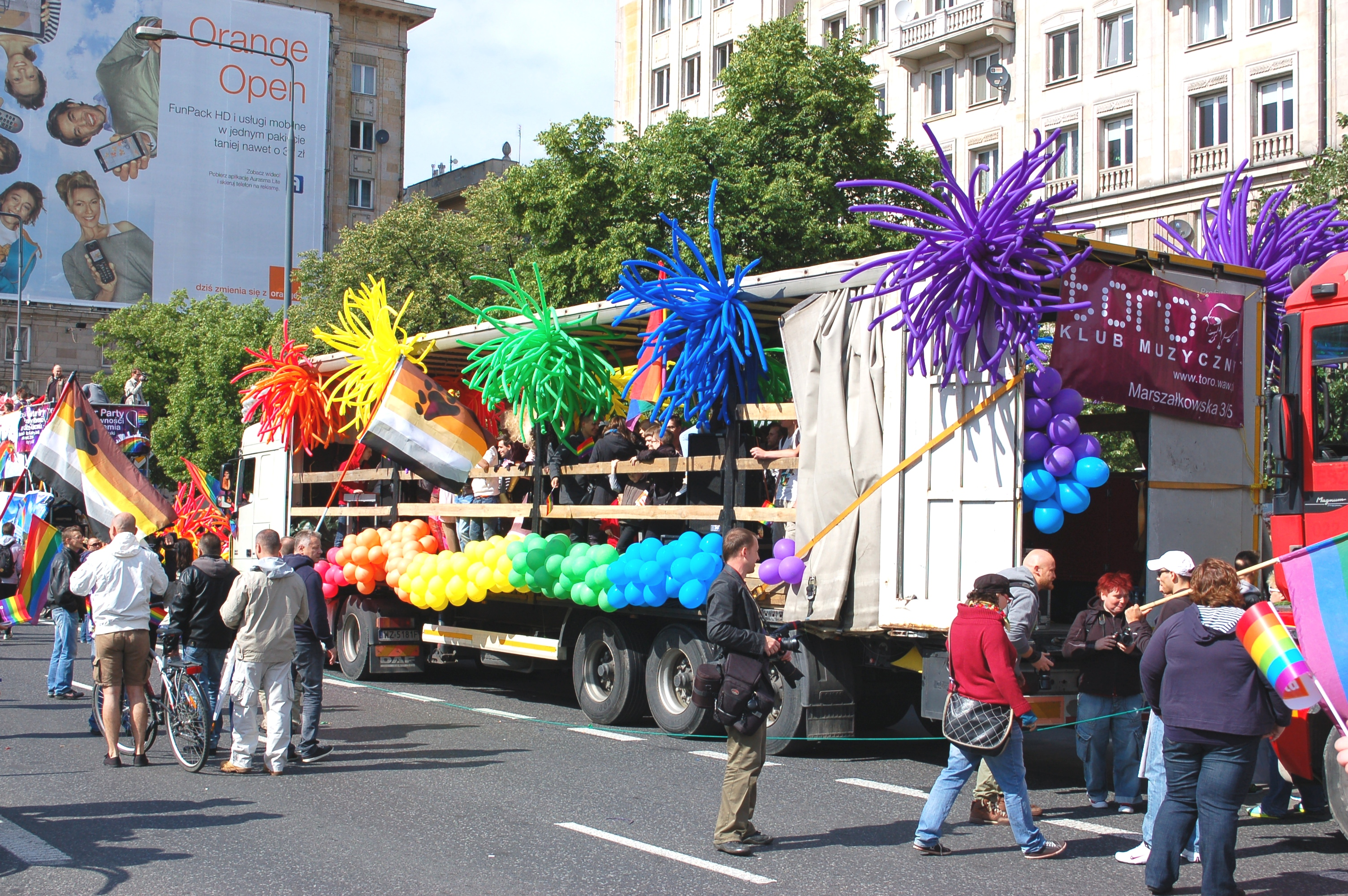 Parada Równości 2012, Warschau